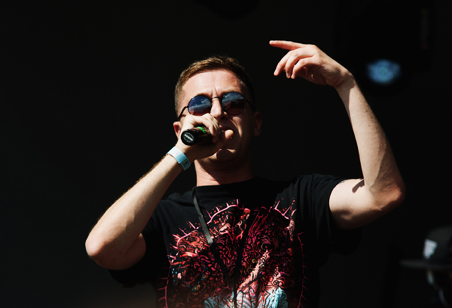 Oxxxymiron на фестивале Пикник «Афиши» в Коломенском